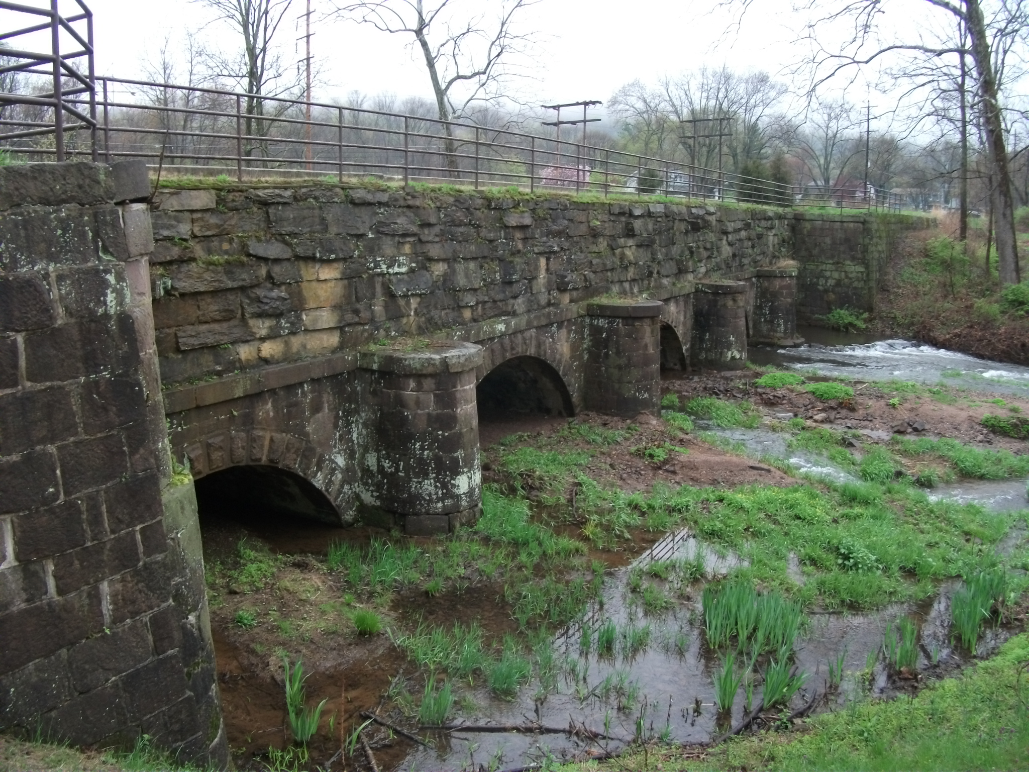 Allegheny Aqueduct - Gibraltar, Pennsylvania